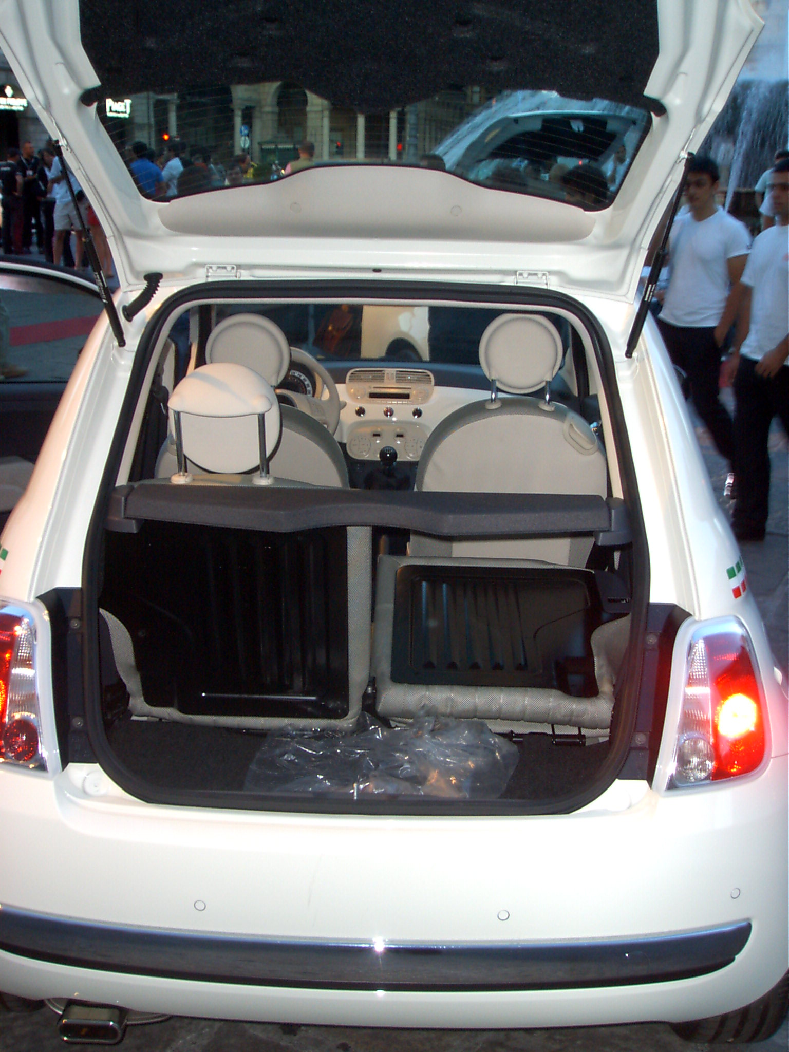 la nuova 500 Fiat viene presentata a Genova/vano posteriore